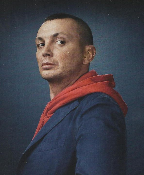 Портрет Дмитрия Шорина